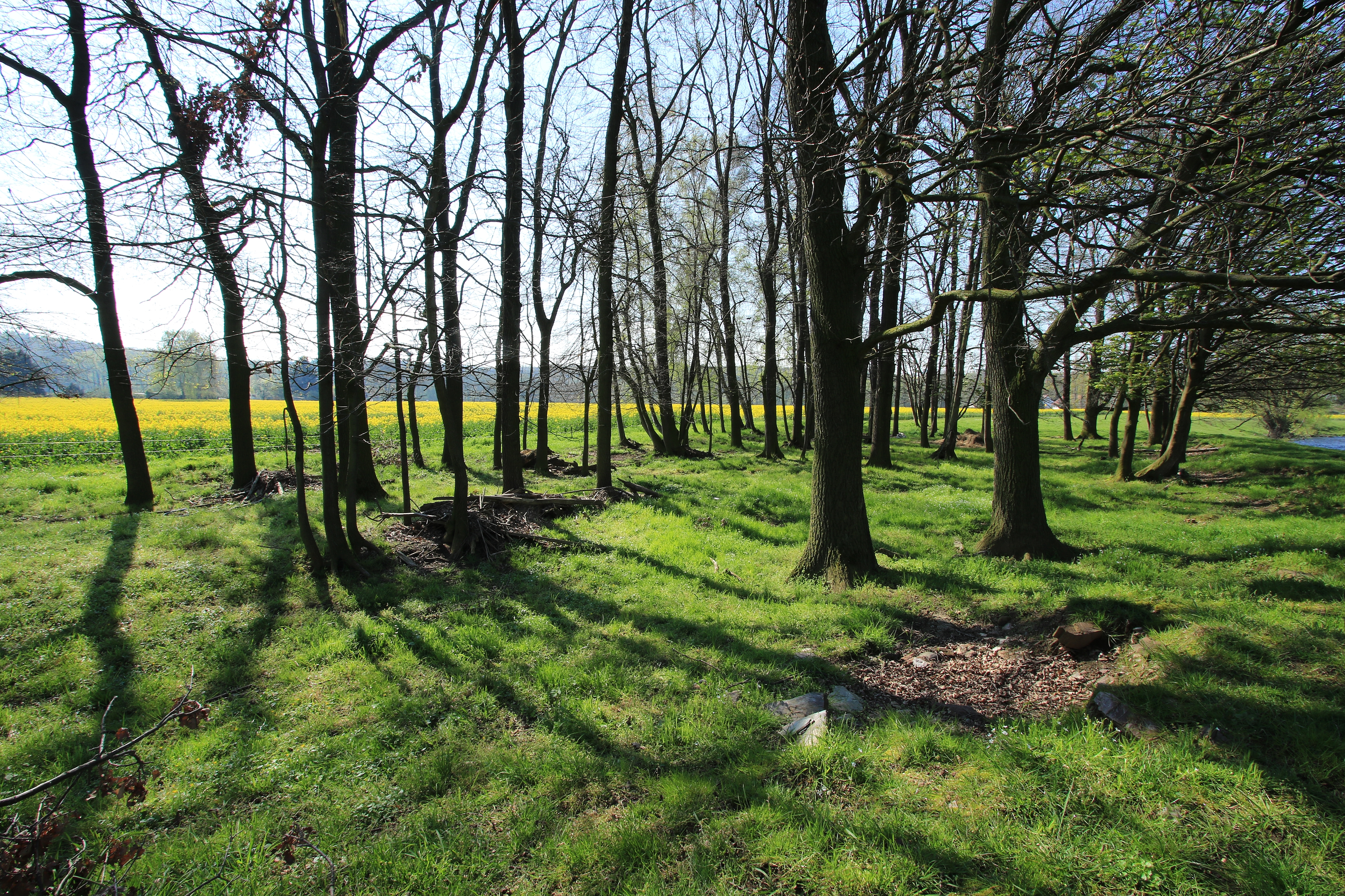 Landschaft an der Zwickauer Mulde (Ufer am rechten Bildrand) im Dorf Remse bei Waldenburg; Fluss und baumbestandener Bereich am Ufer im FFH-Gebiet DE-4842-301 „Mittleres Zwickauer Muldetal“, des Weiteren Landschaftsschutzgebiet „Mulden-und Chemnitztal“.